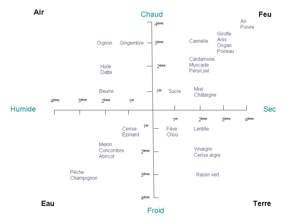 Diagramme représentant les quatre humeurs d'Hippocrate d'après la théorie classique d'Aristote avec une classification en quatre degrés des qualités (revu par Claude Galien)